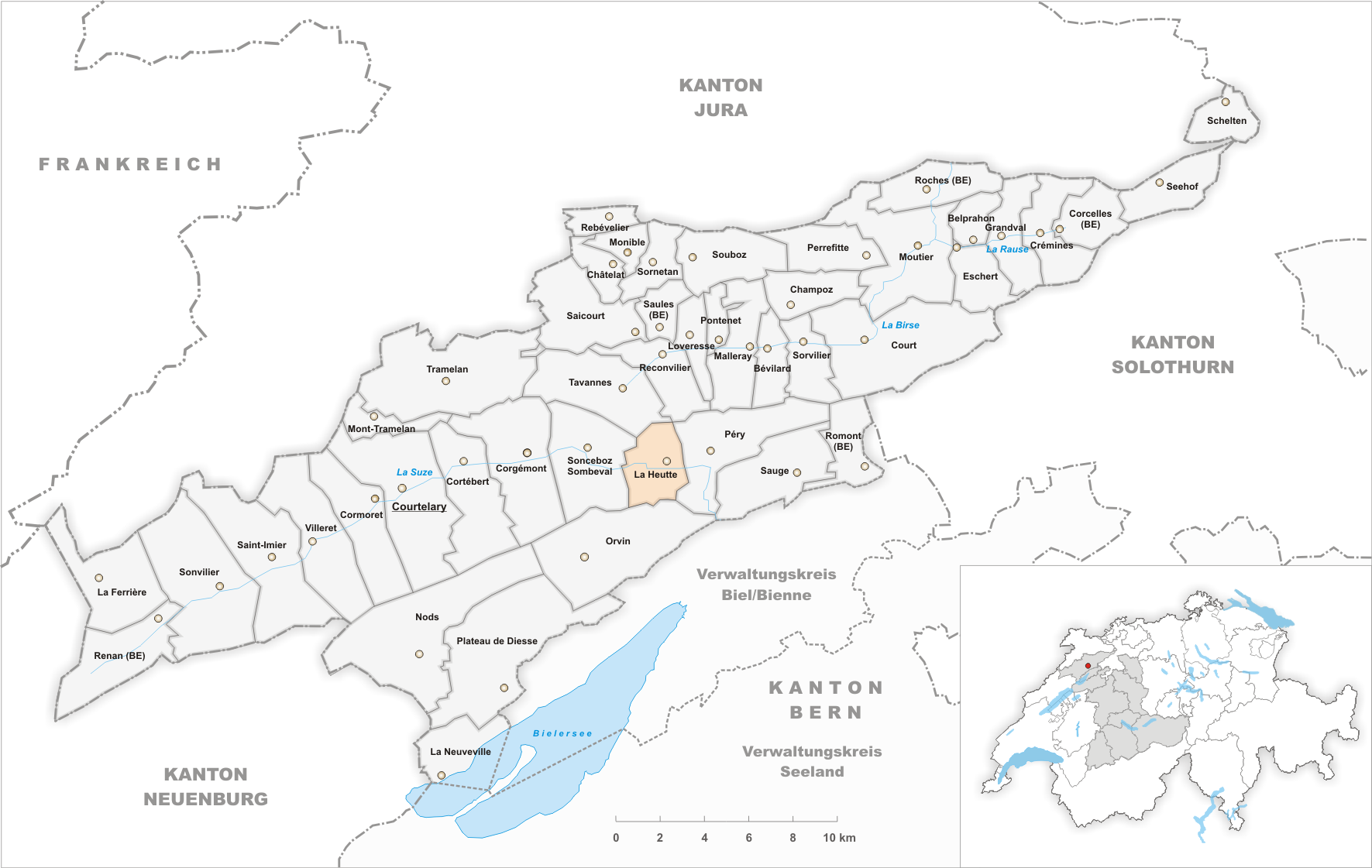 Municipality La Heutte